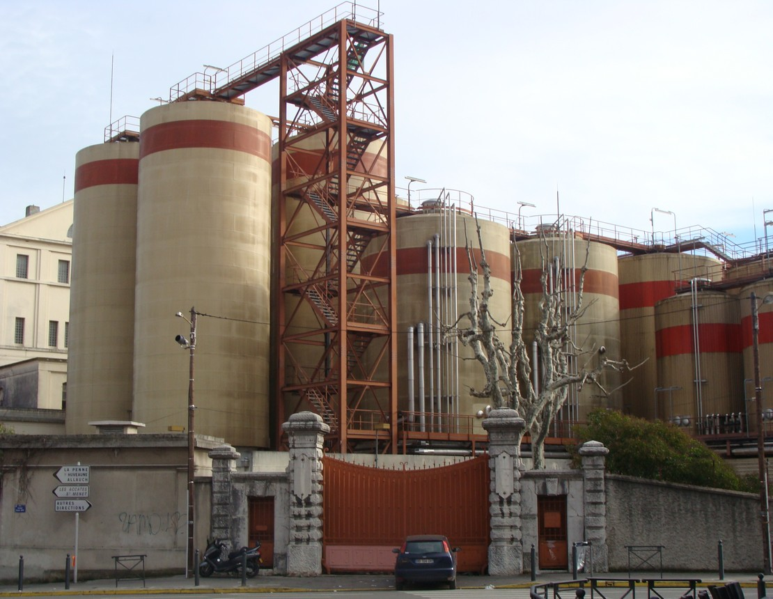 L'usine Heineken de la Valentine (Marseille 11e arr.), vue partielle.